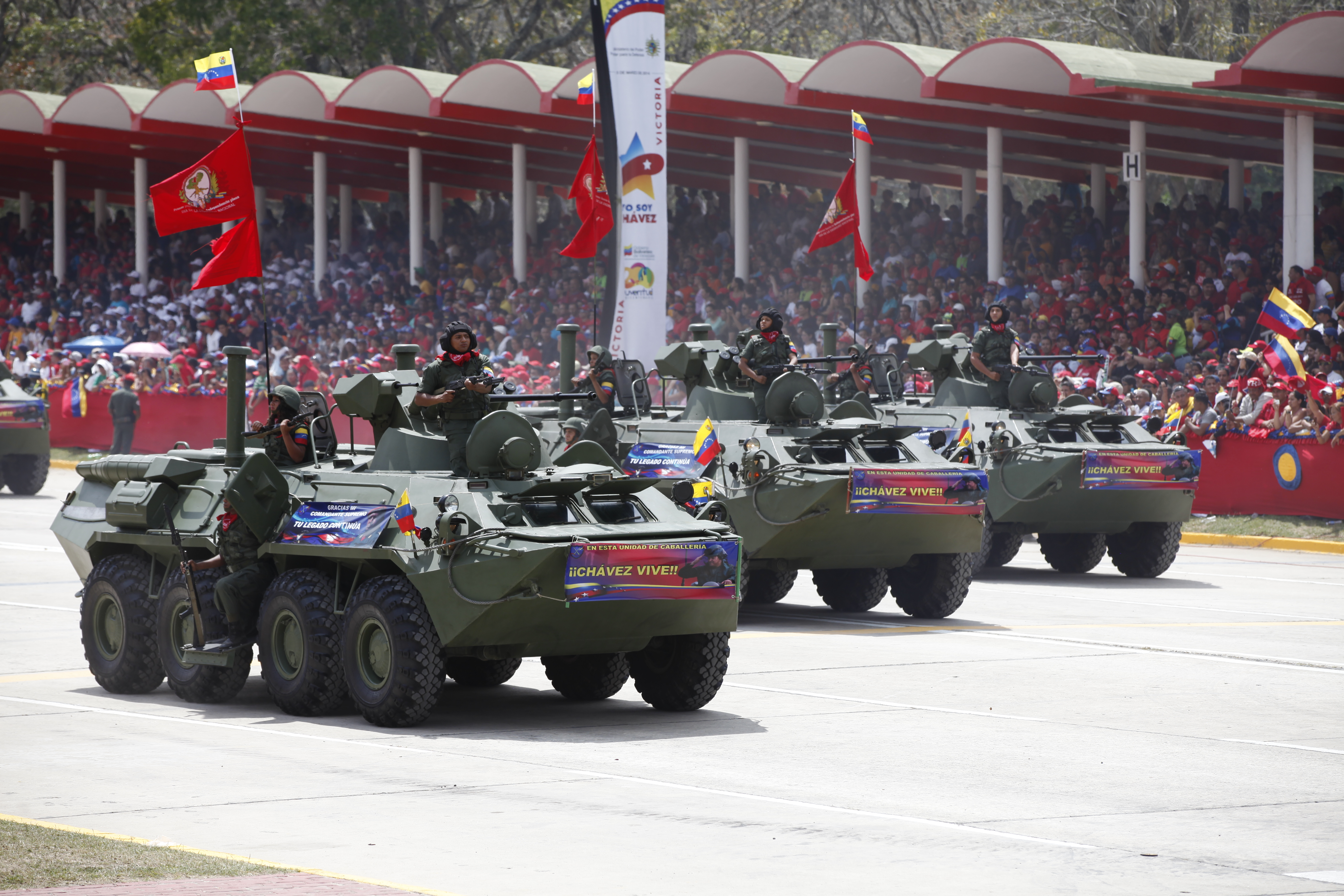 BTR-80, Caracas (Venezuela), 05 de Marzo del 2014. El Canciller del Ecuador, Ricardo Patiño, participó en los actos de conmemoración de la muerte del Comandante Hugo Chávez Frías. Foto: Xavier Granja Cedeño / Cancilleria Ecuador